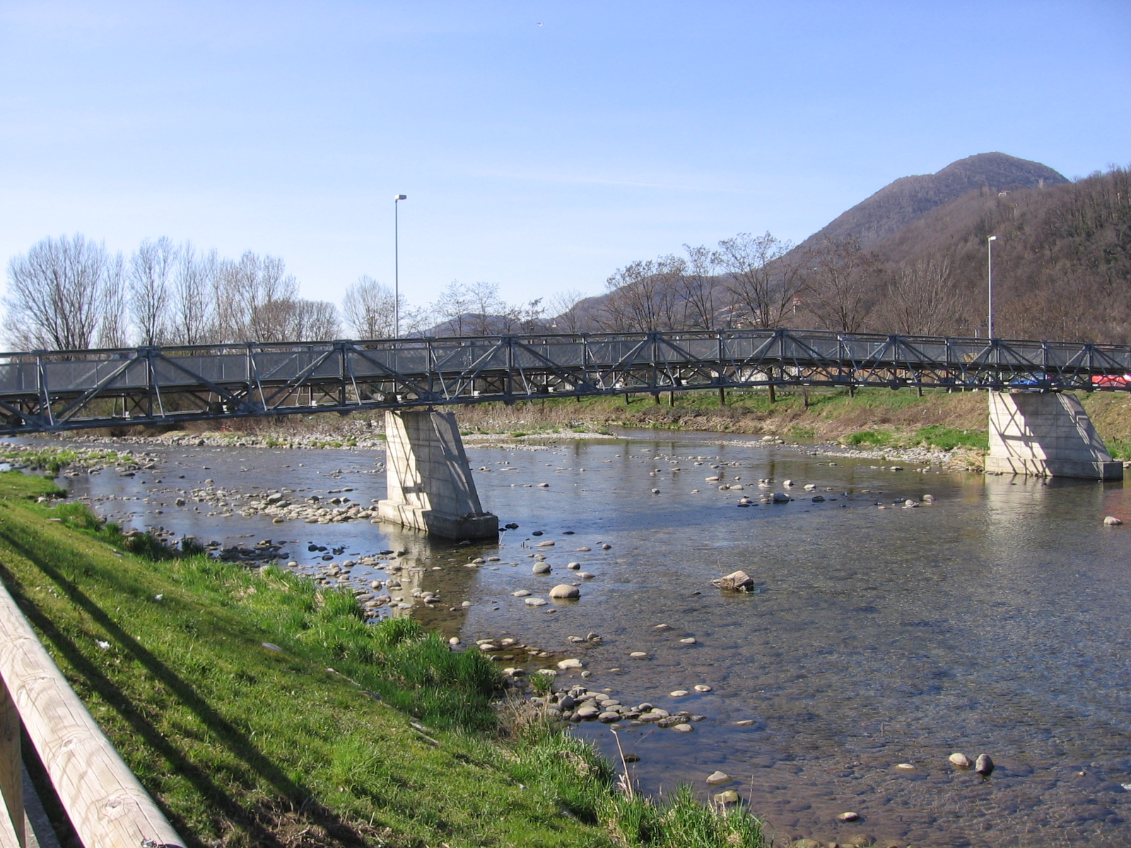 Serio tra Pradalunga ed Albino, Bergamo, Italy